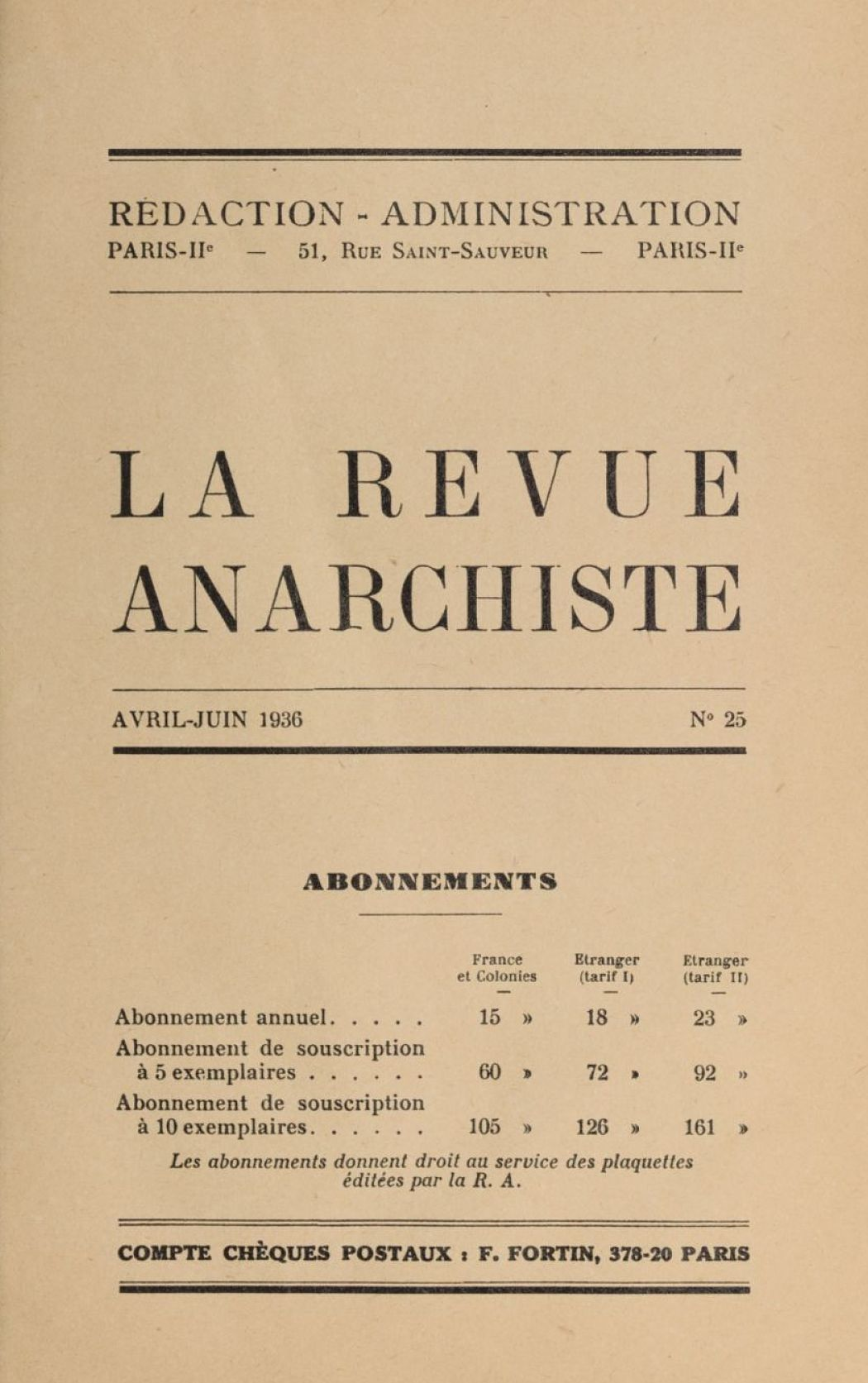 La Revue anarchiste : Cahiers mensuels d'études et d'action (1929-1936) - d'abord sous-titrée Cahiers mensuels d'études et d'action puis Organe trimestriel de documentation et d'études